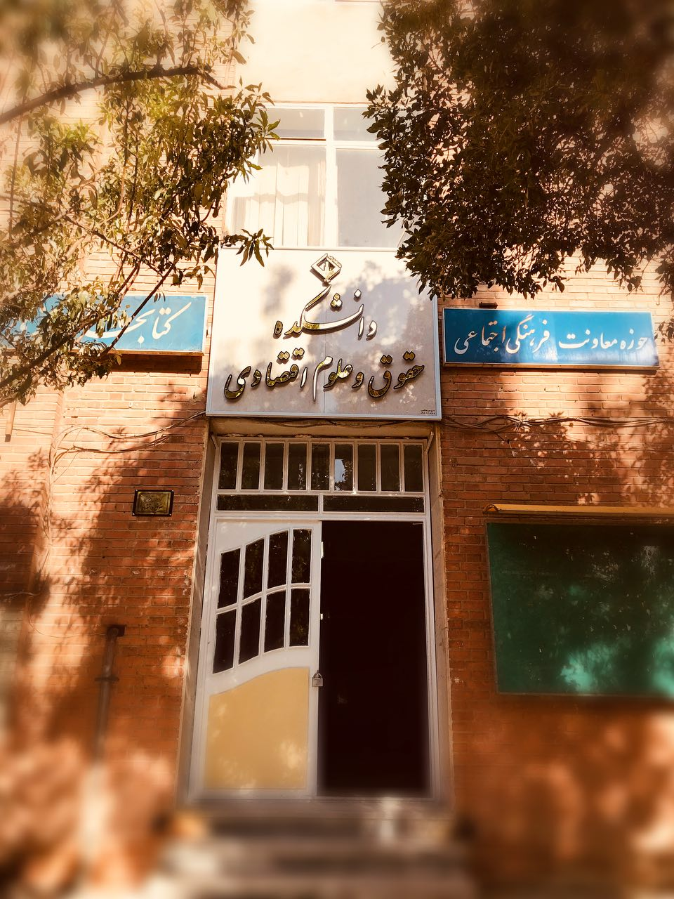 دانشکده حقوق و علوم اقتصادی دانشگاه اراک